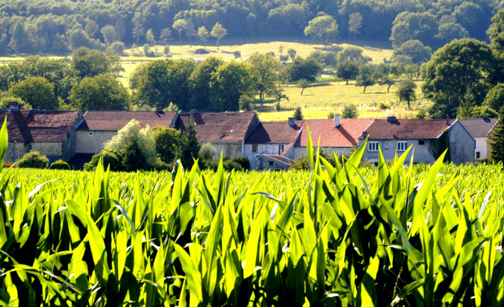 Nijon (Haute-Marne)